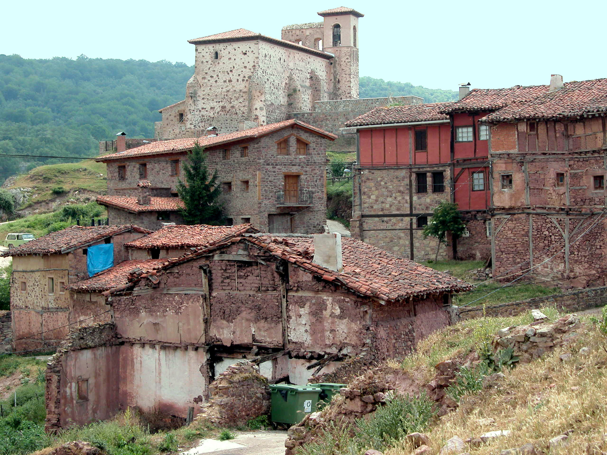 Pinillos (La Rioja - España)